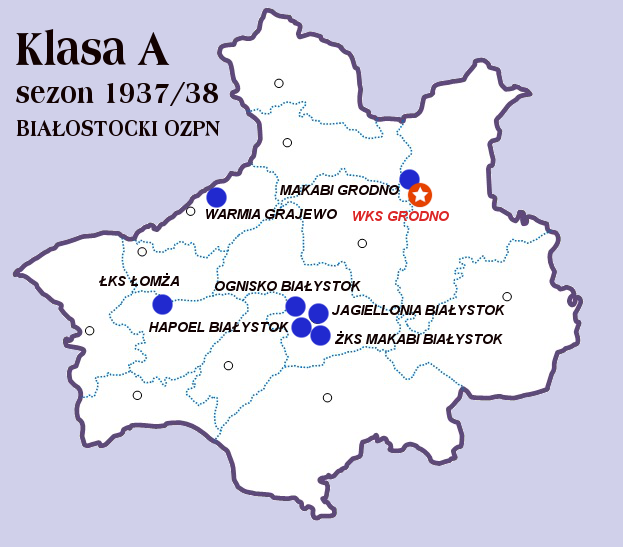 Klasa A Białystok 1937/38